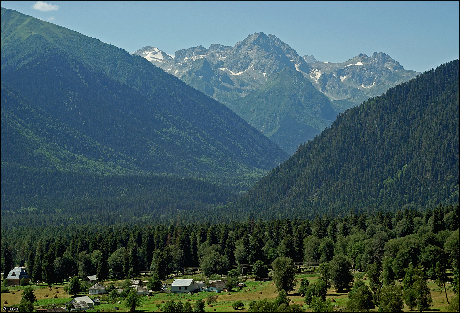 Посёлок Архыз, вдали гора Кара-Джаш